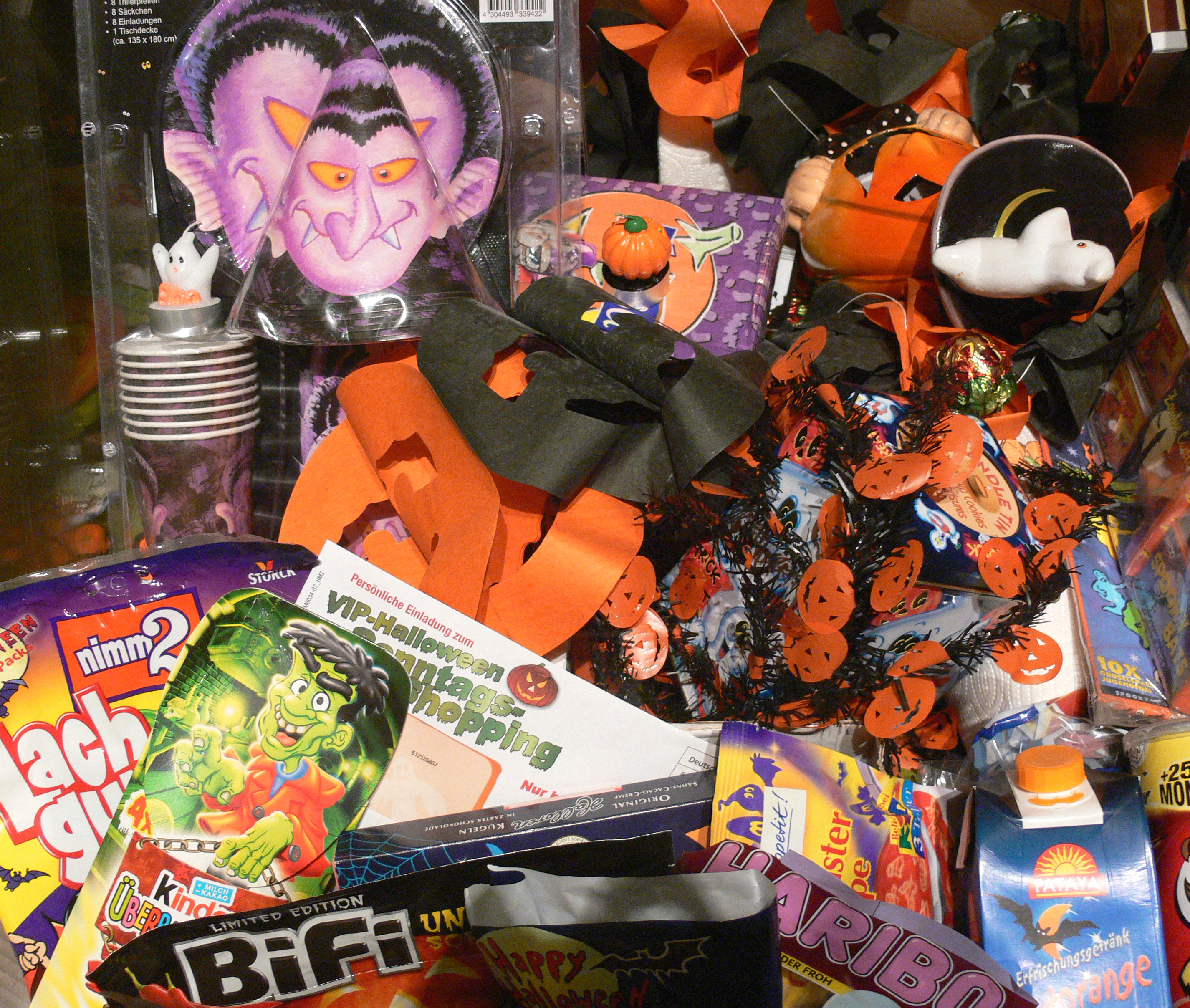 Deutsche Halloween-Artikel der 2000er Jahre (Sammlungsbeginn: 1999) Museum Europäischer Kulturen, Berlin